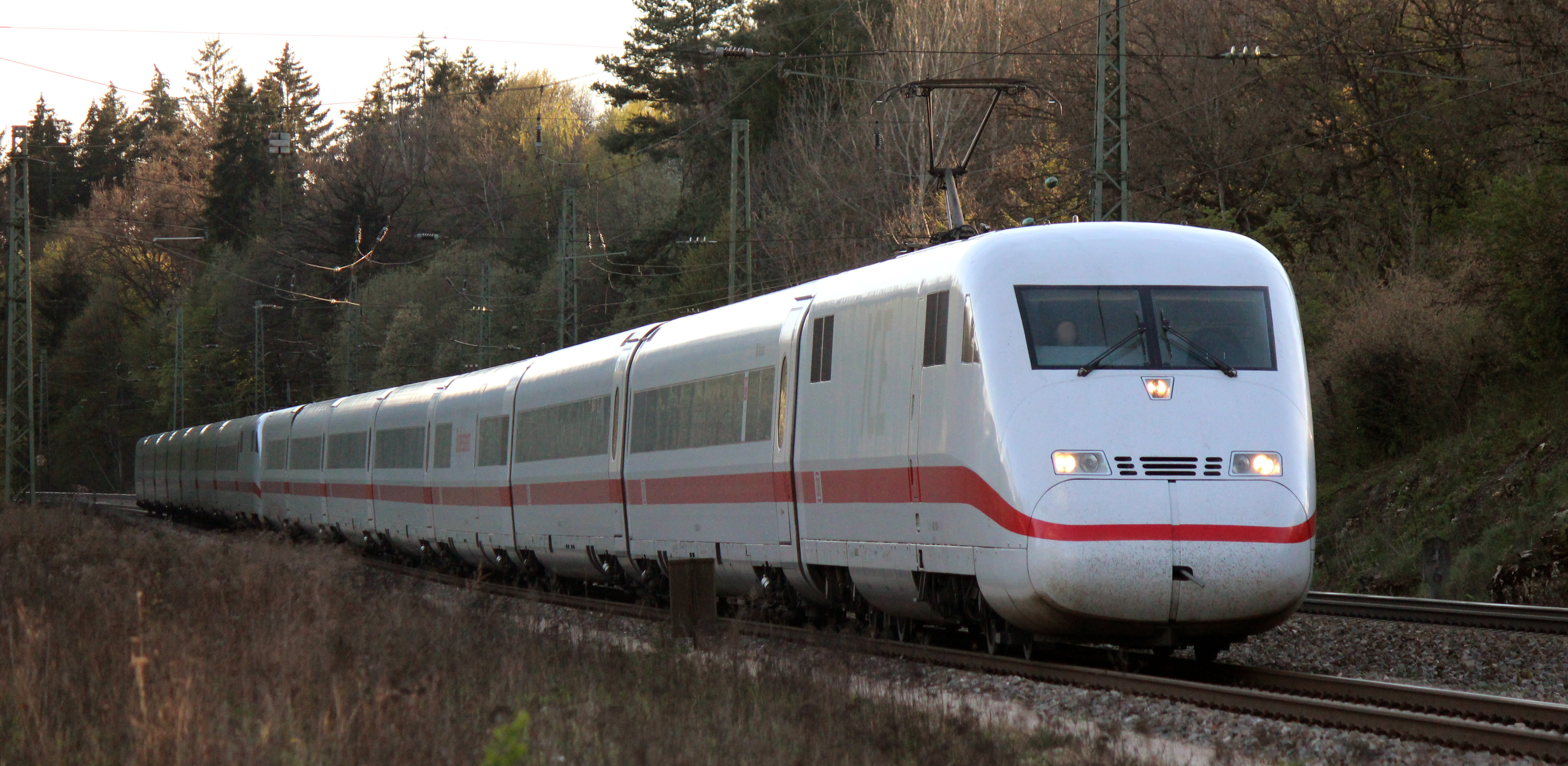 Ein ICE-2-Doppelgespann. Leider habe ich die Nummer der zweiten ICE-Einheit nicht mehr erkennen können. Der Lokführer war hier außerordentlich gut zu erkennen.